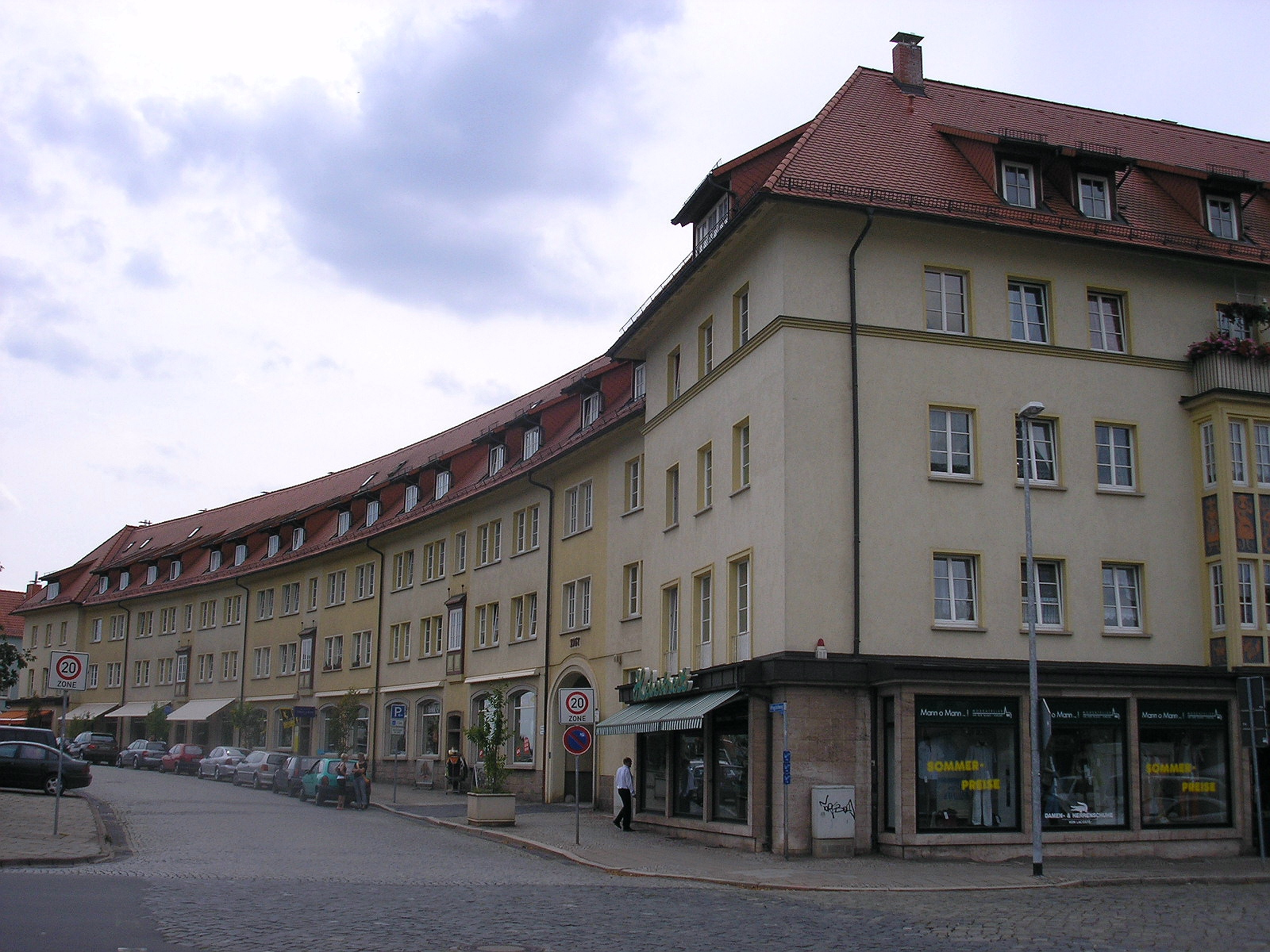 Ein Rundwohnblock von 1957 in der kriegszerstörten Altstadt von Nordhausen (Thüringen).